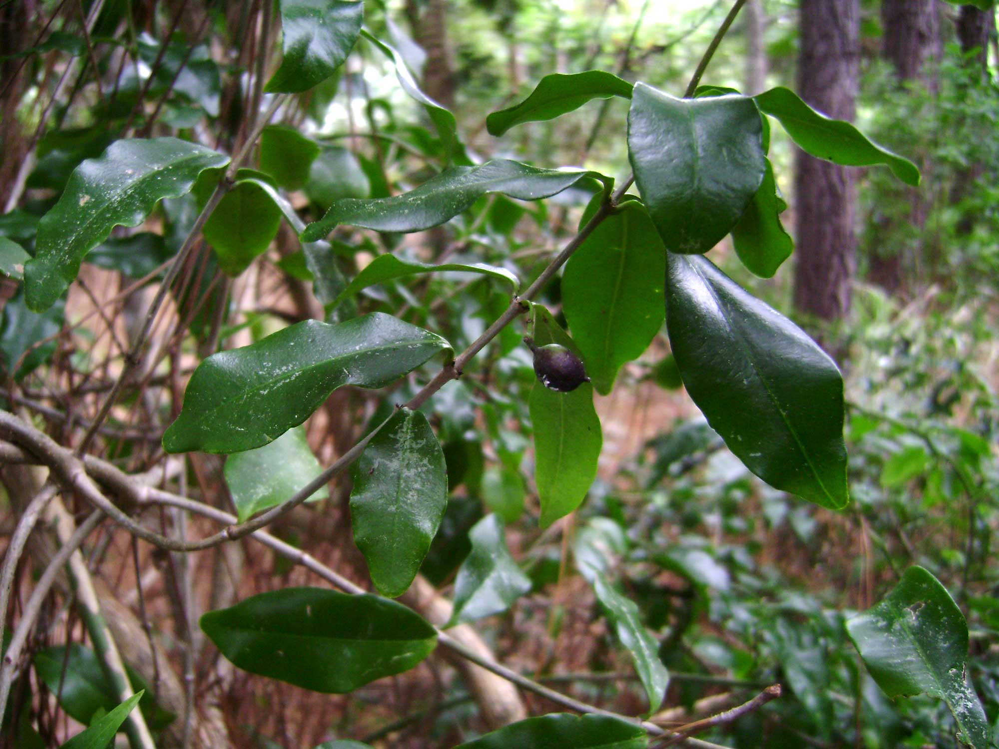 Jasminum simplicifolium; (tutuʻuli) in Vavaʻu, Tonga; ʻEneʻio botanical garden